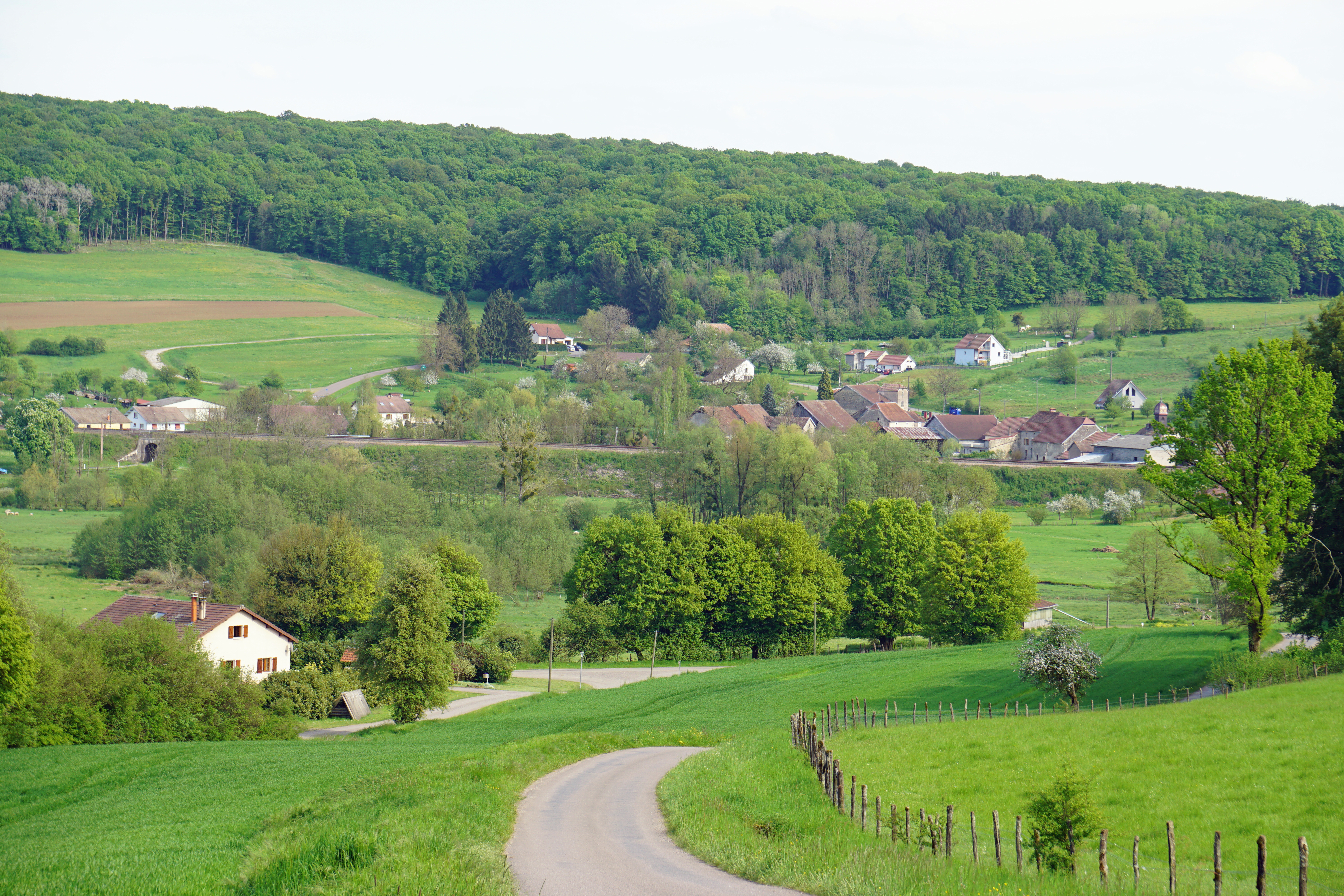 Vue générale de La Creuse.